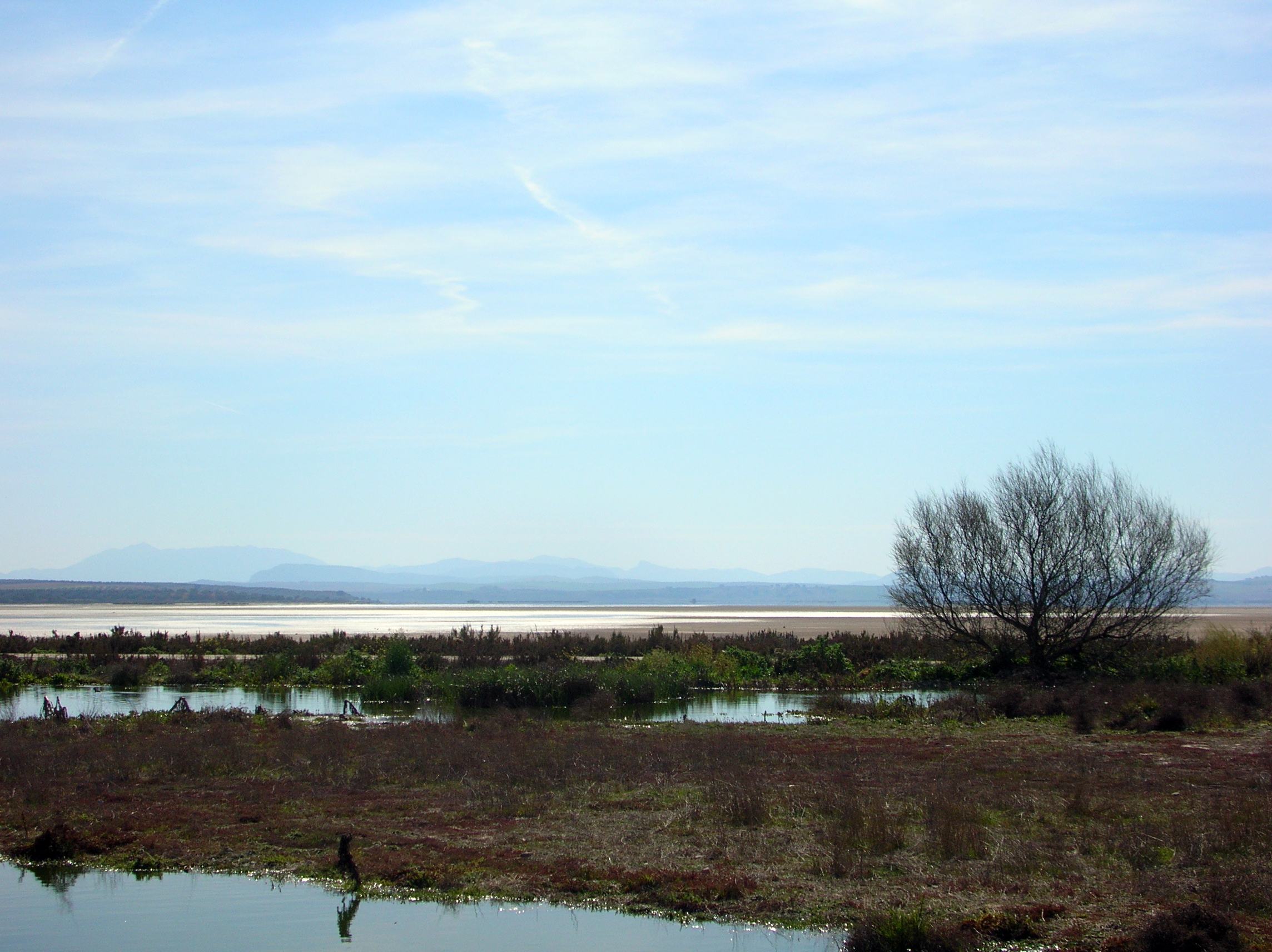 Lagune de Fuente de Piedra (comarque d'Antequera, province de Malaga, Espagne)